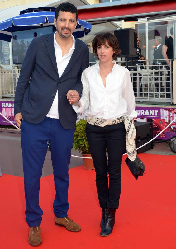 Samir Guesmi et Florence Loiret Caille lors de la présentation de "L'Effet aquatique" au festival de Cabourg